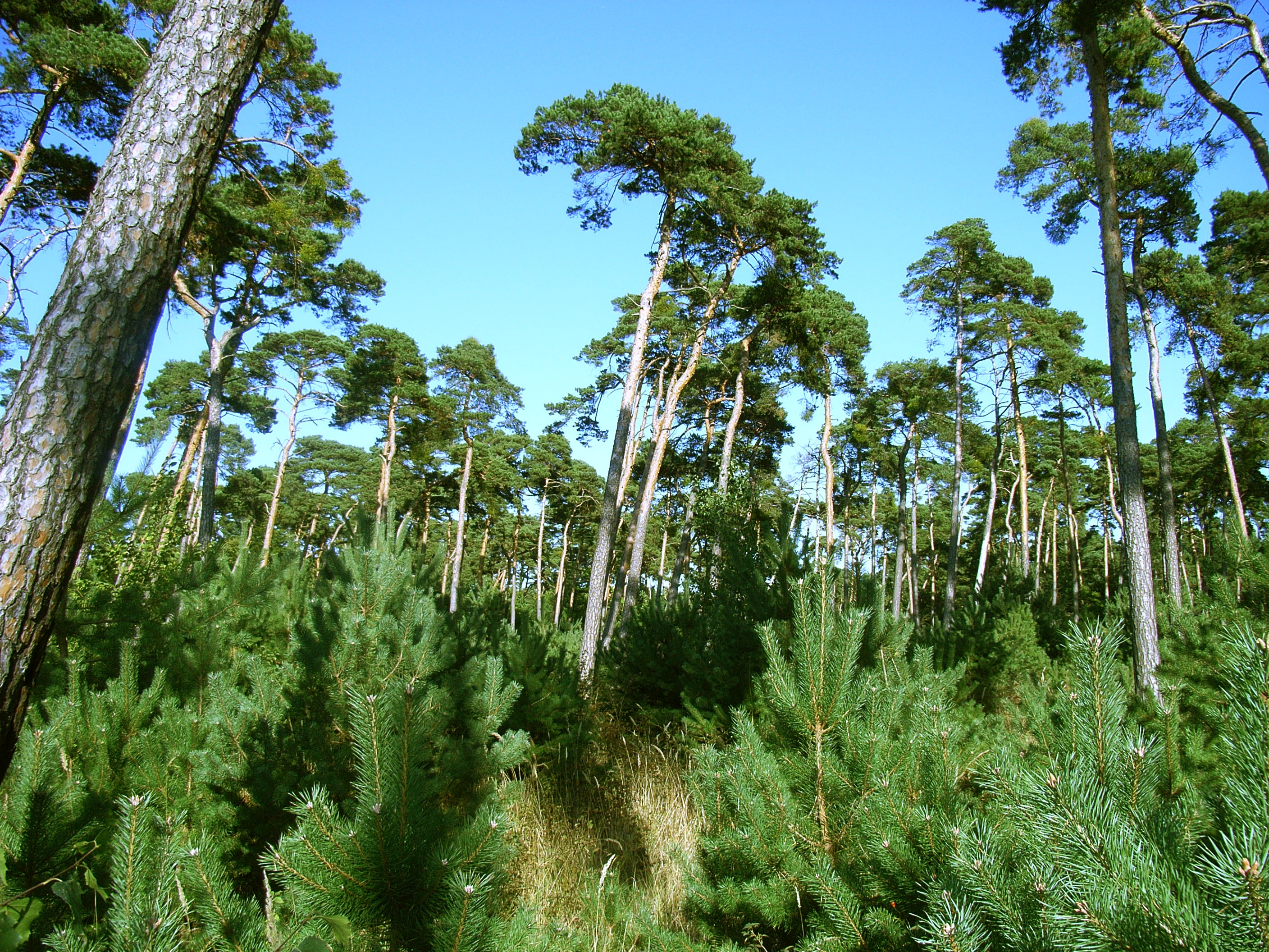 Lennerbergwald, Uhlerborn